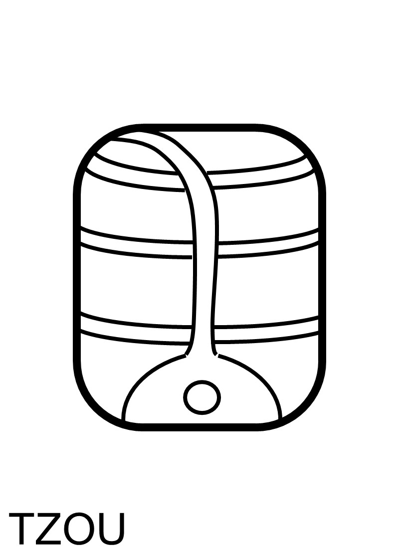 2e Syllabogramme maya TZOU